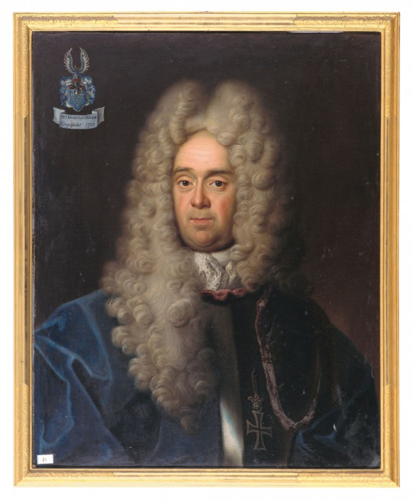 Otto Dietrich von Bülow (1655 - 1732) - Öl/Lwd. 85 x 68 cm